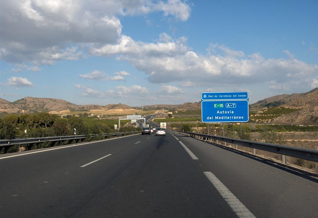 Autovía del Mediterráneo, en algún punto de la Región de Murcia.